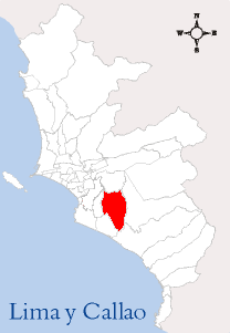 Localización del Distrito de Villa María del Triunfo